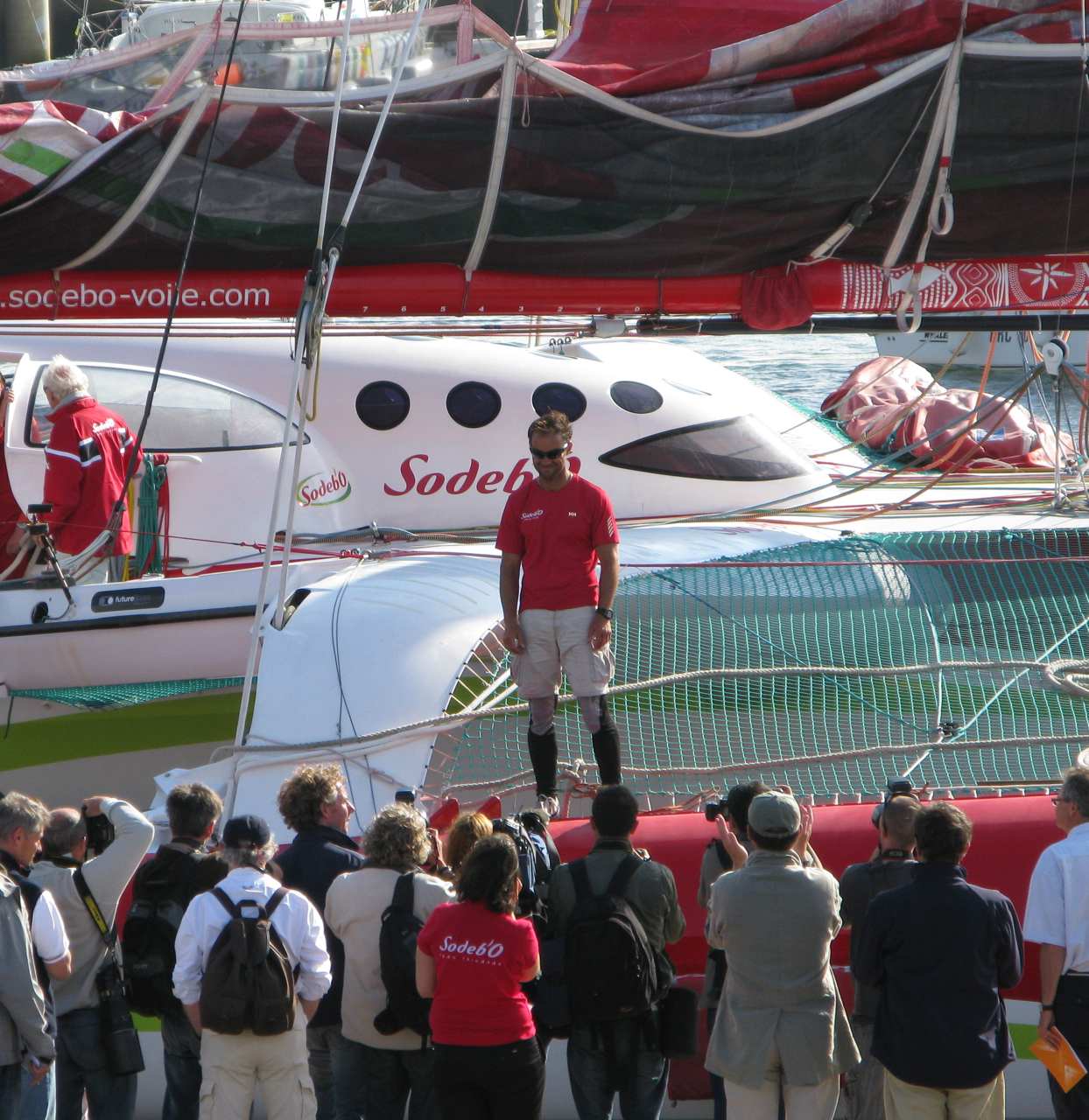 Thomas Coville à Brest 2008 - Record de la traversée de l'Atlantique Nord à la voile en solitaire